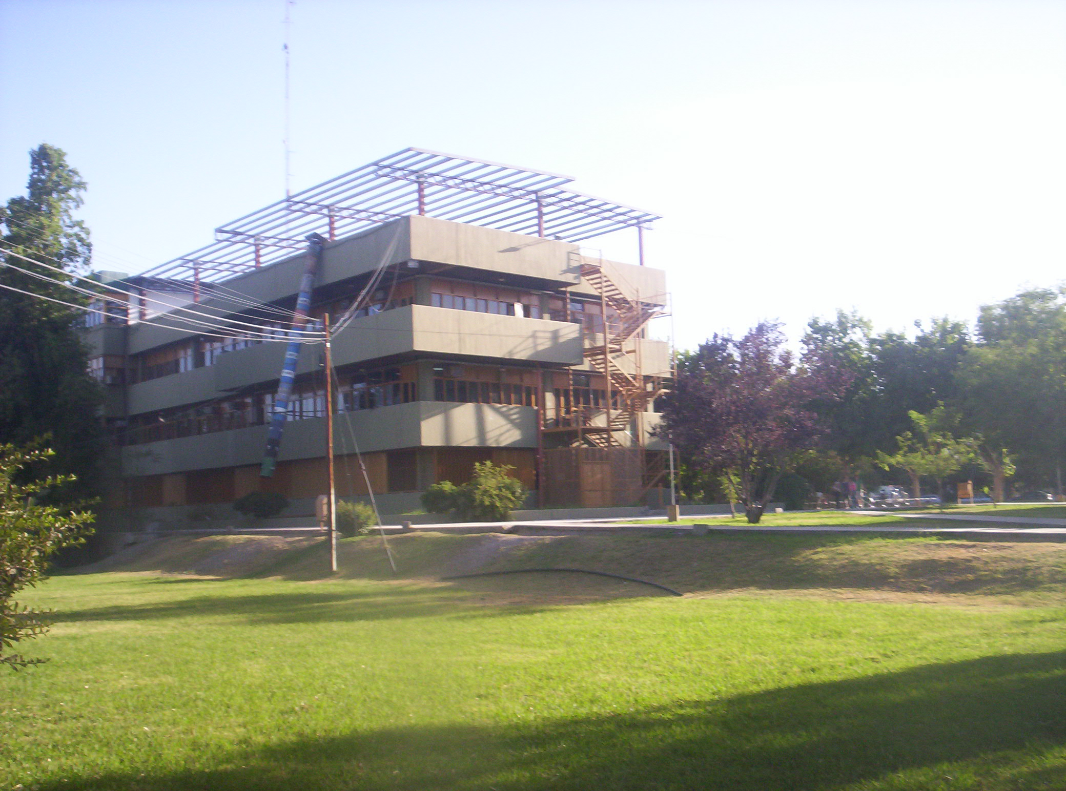 facultad de exactas del cuim